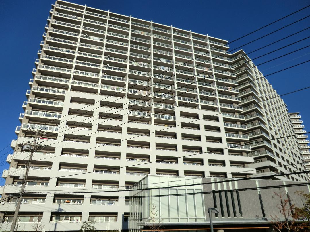 江戸川左岸、クレストシティタワーズ